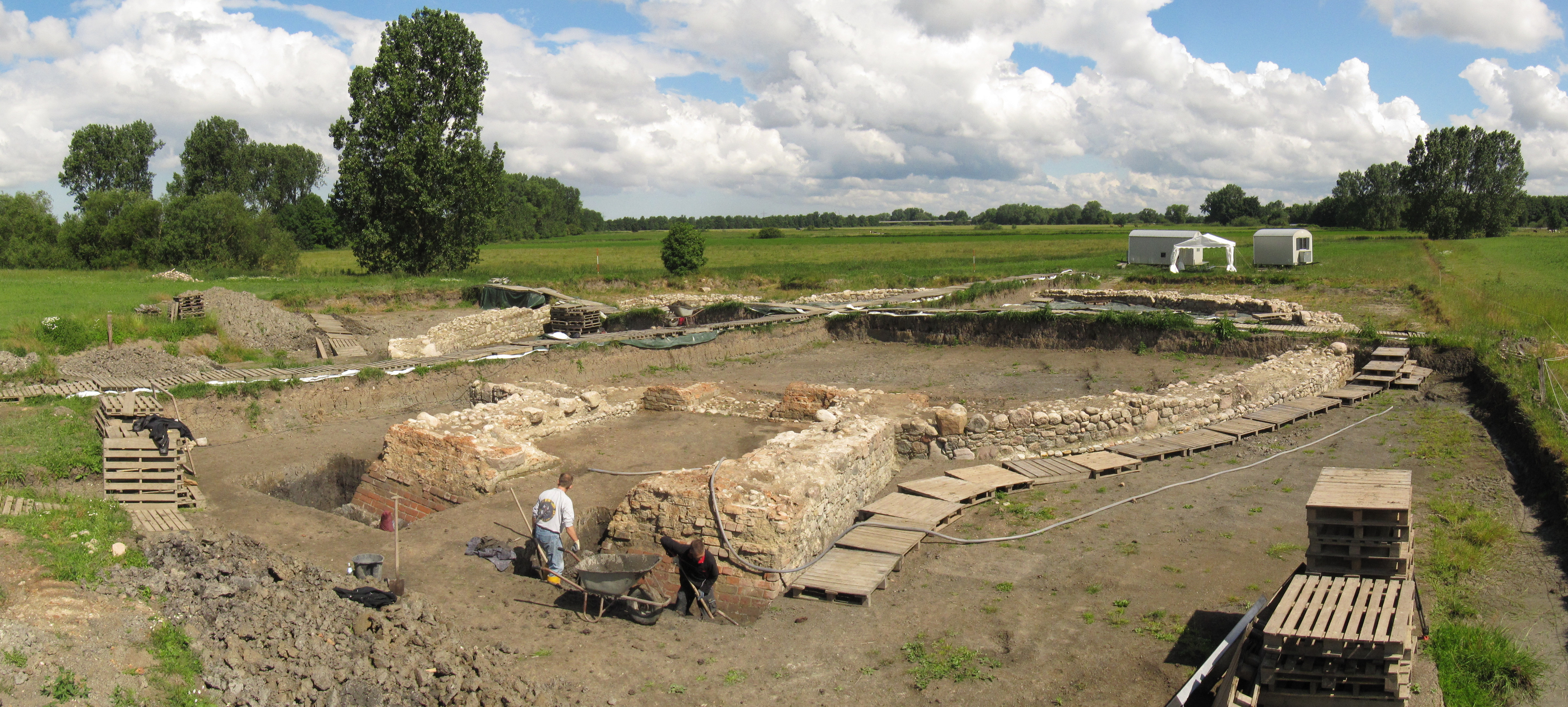 Panorama der Burgruine Stotel von einer Leiter gesehen